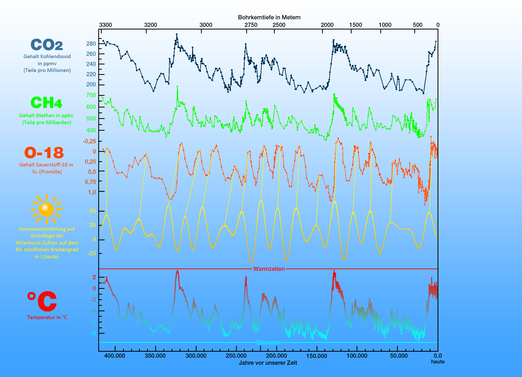 Die Daten Stammen aus Eiskernbohrungen der der Vostok-Station (Antarktis). Die auf Grundlage der Milanković-Zyklen errechnete Sonneneinstrahlung scheint direkten Einfluss auf die Klimadaten zu haben.